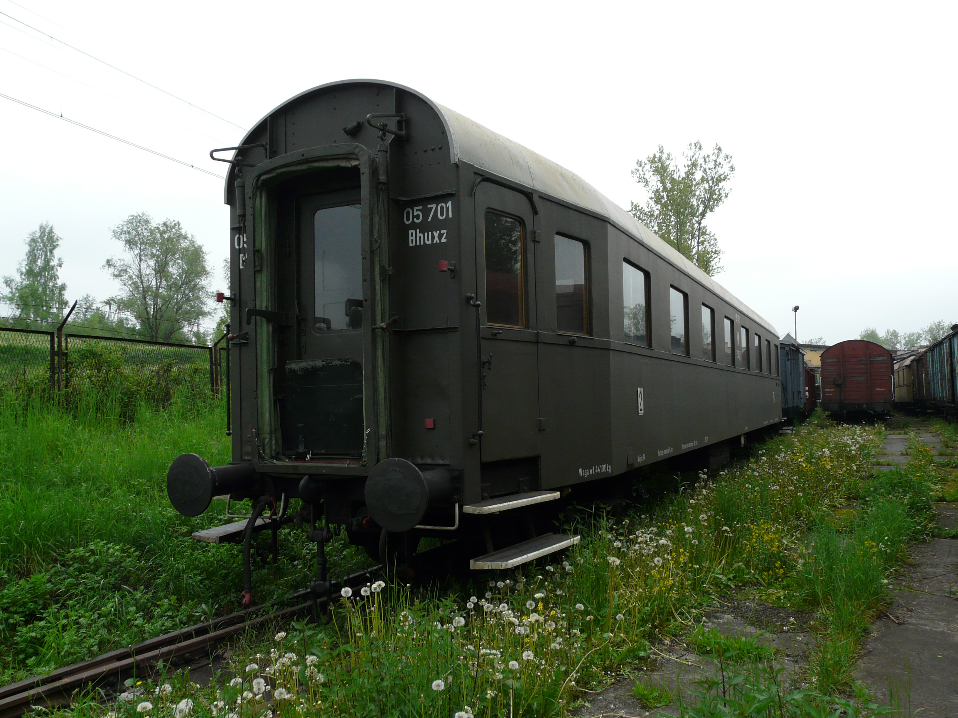 Skansen taboru kolejowego w Chabówce / Chabówka Rolling-Stock Heritage Park